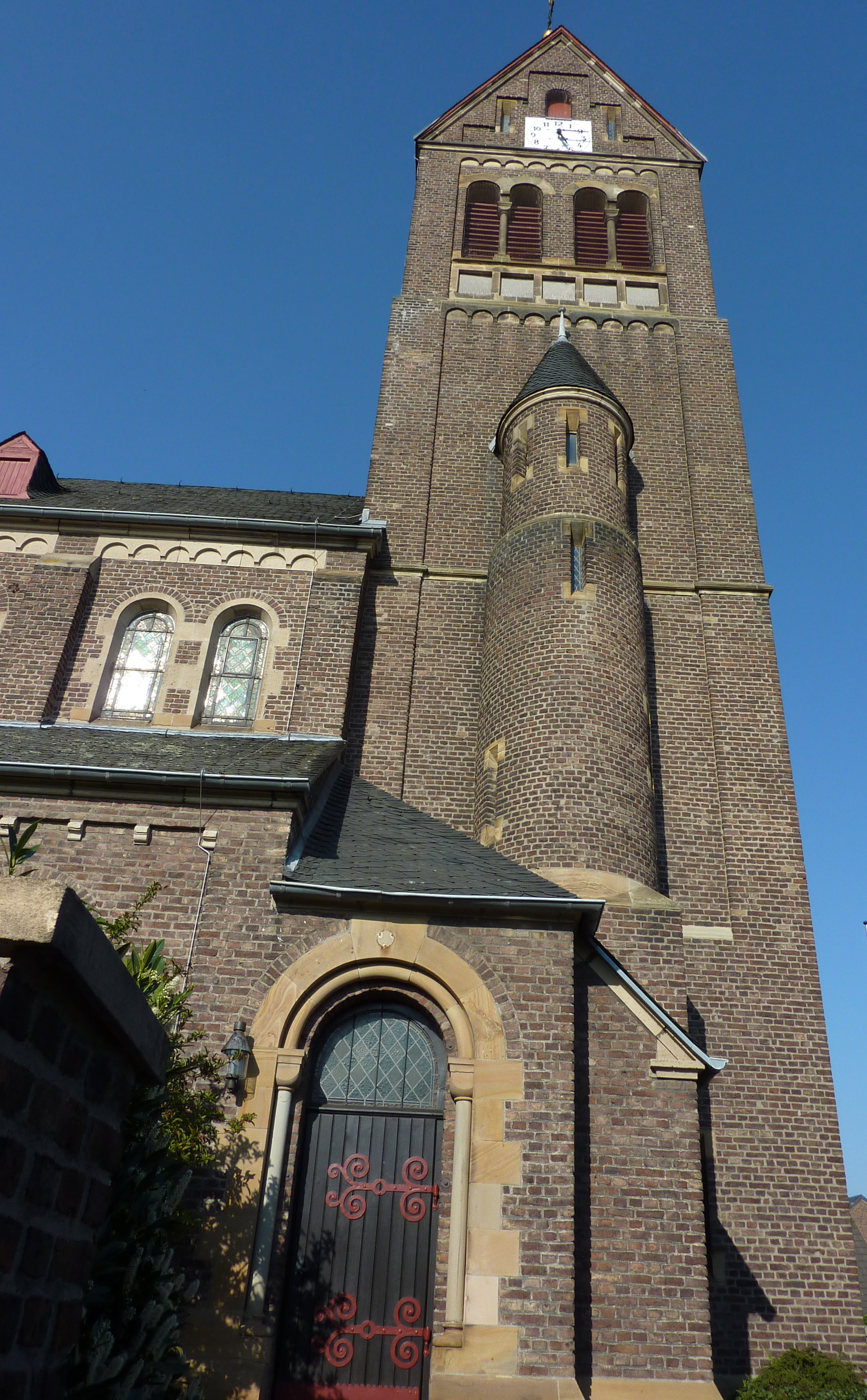 katholische Pfarrkirche St. Martinus in Ollheim